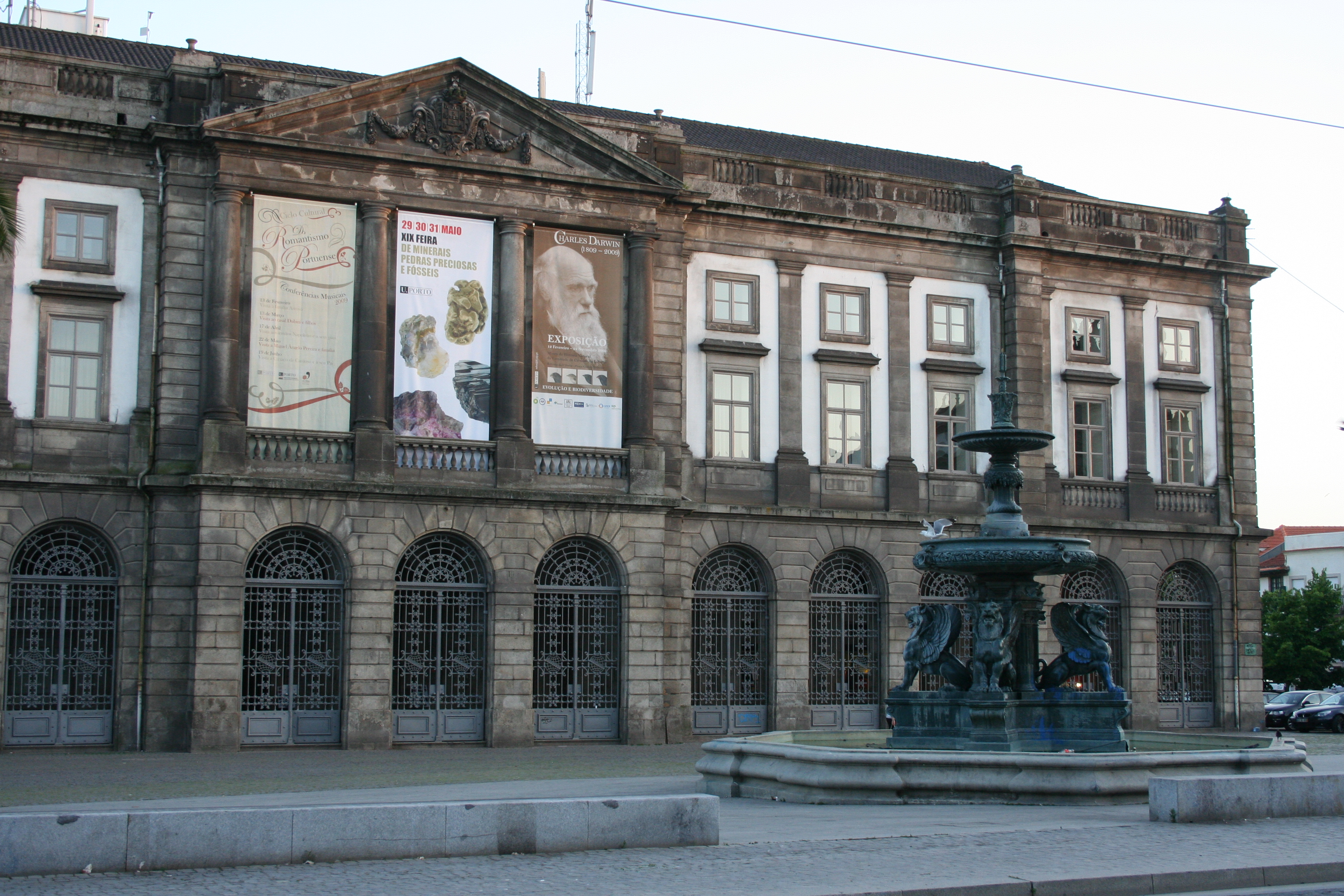 Edifício da Reitoria da Universidade do Porto This file was uploaded for Wiki Loves Monuments in Portugal with the unique identifier 97025042.